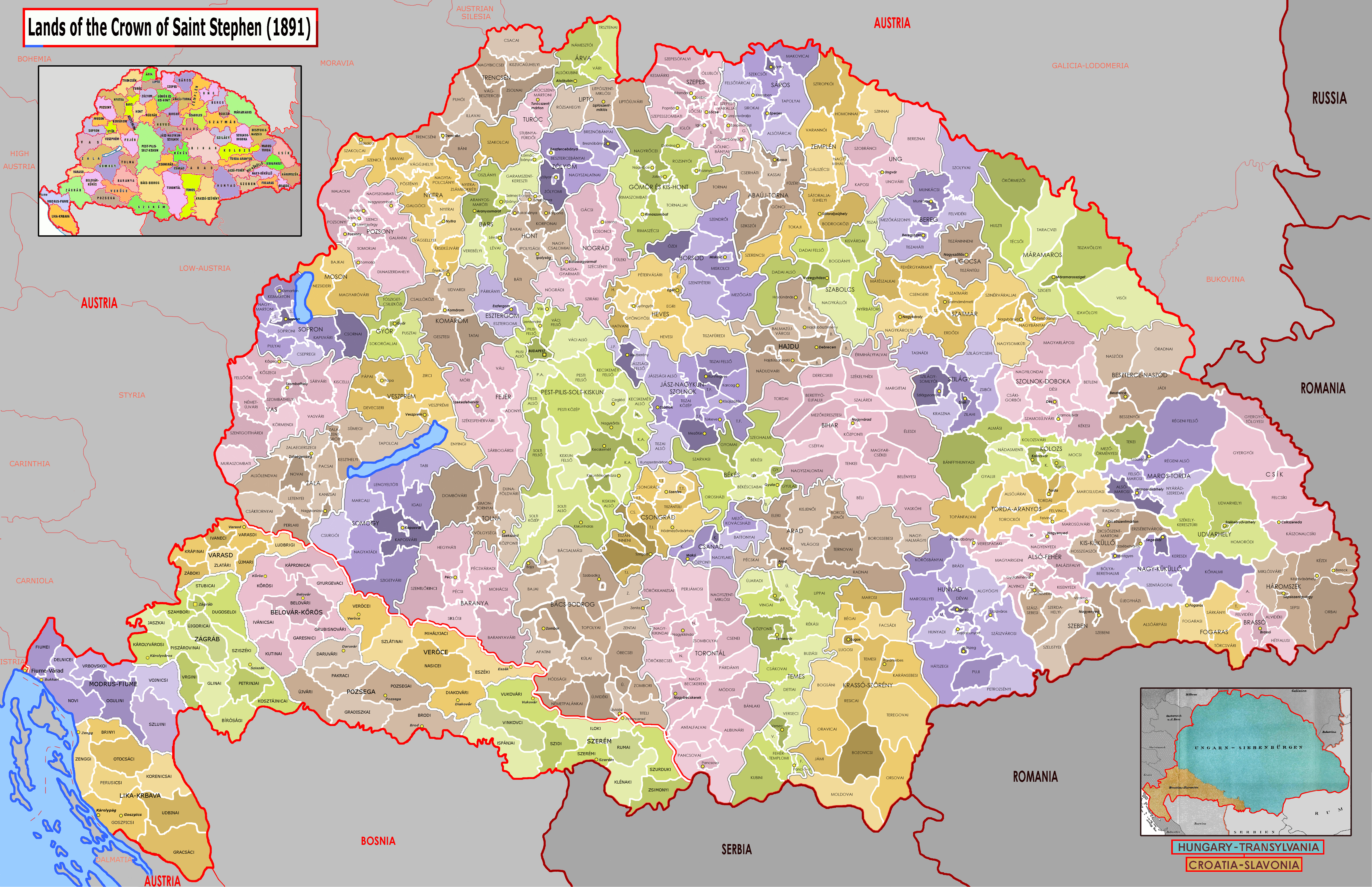 Carte administrative du Royaume de Hongrie (1891)